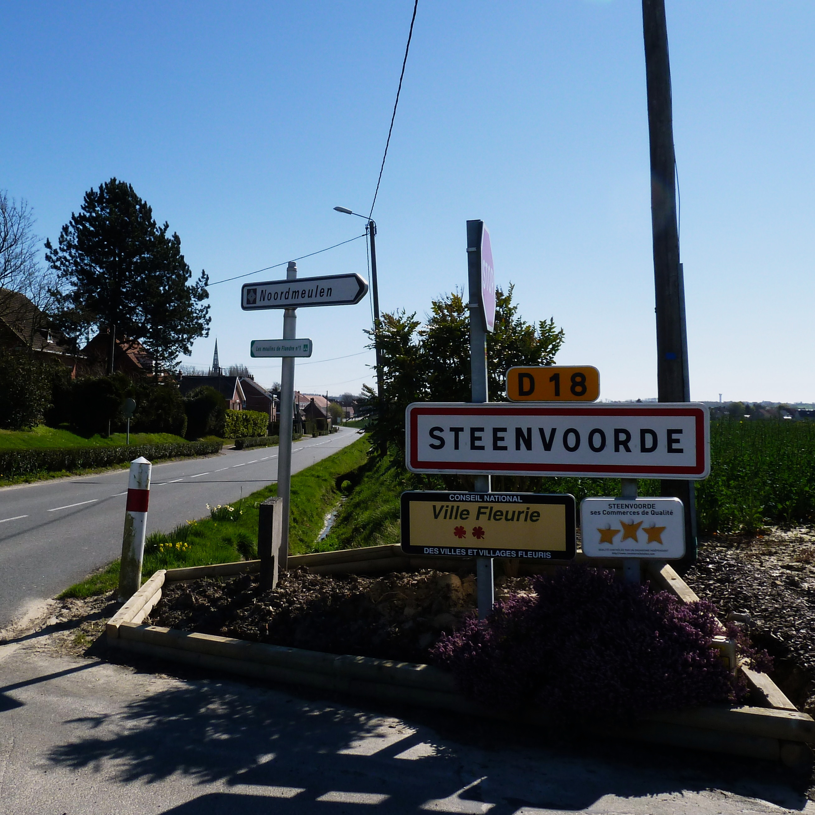 City limit sur la D18 Steenvoorde Nord.- France.